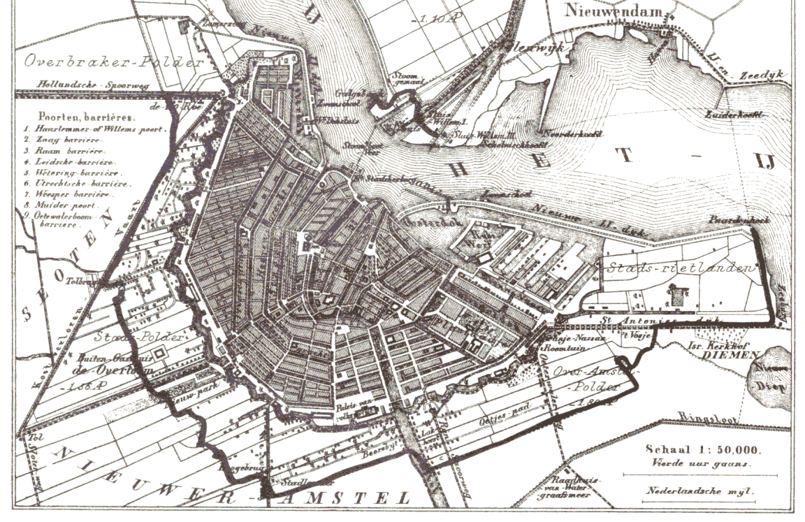 Kaart van Amsterdam in 1866. De stad is sinds de zeventiende eeuw nauwelijks uitgebreid. In de jaren vlak na het maken van deze kaart werden de nieuwe woonwijken aangelegd die nu bekend zijn als de negentiende-eeuwse gordel.